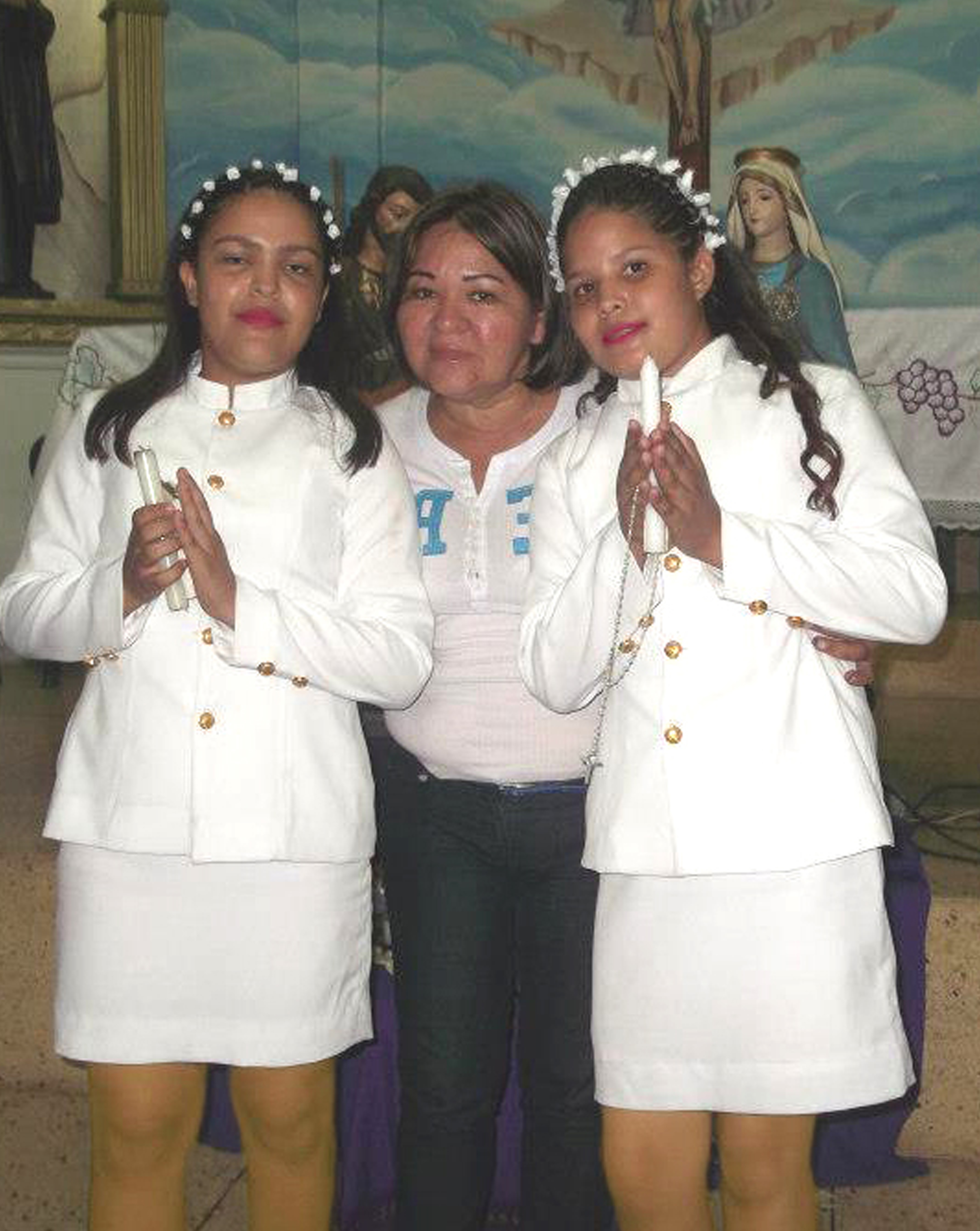 Niñas con vestario contemporano